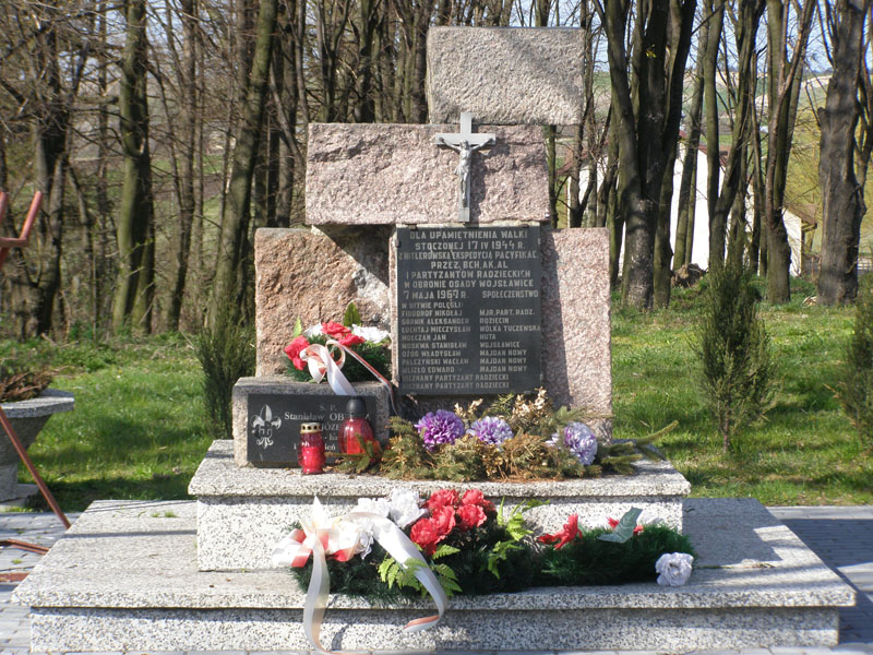 PL, Poland, lubelskie, Wojsławice